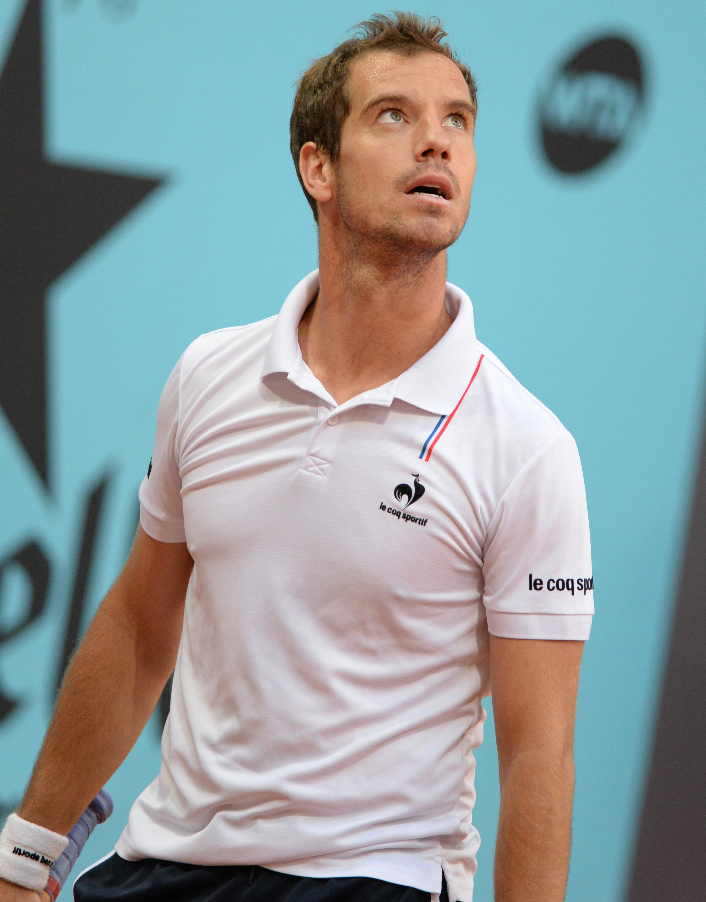 Richard Gasquet